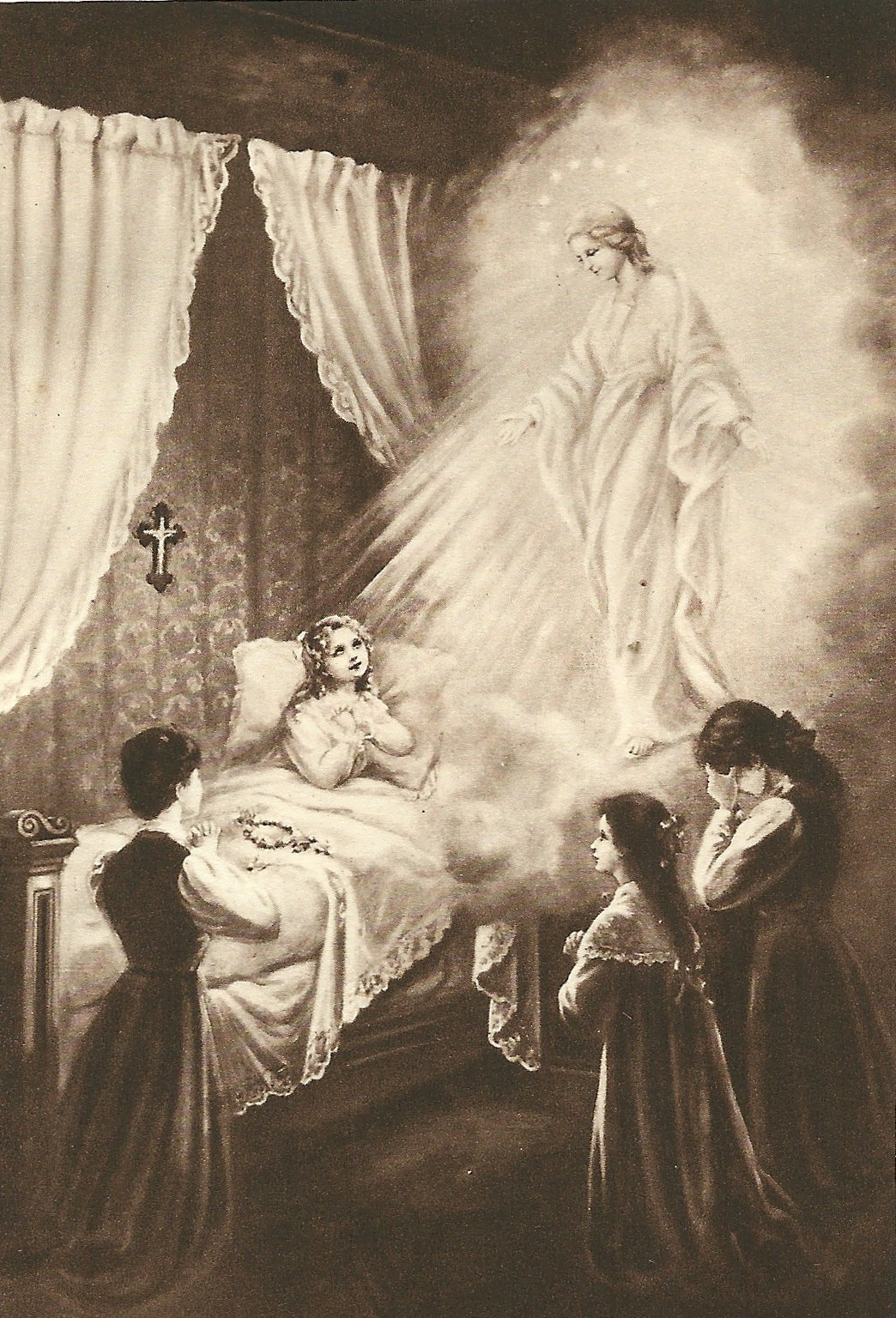 Gravure de Sainte Thérèse de l'Enfant Jésus, Histoire d'une âme écrite par elle-même, Lisieux, Office central de Lisieux (Calvados), & Bar-le-Duc, Imprimerie Saint-Paul, 1937, édition 1940. « La petite Thérèse, à l'âge de 10 ans, guérie par la très Sainte Vierge - 13 mai 1883. »